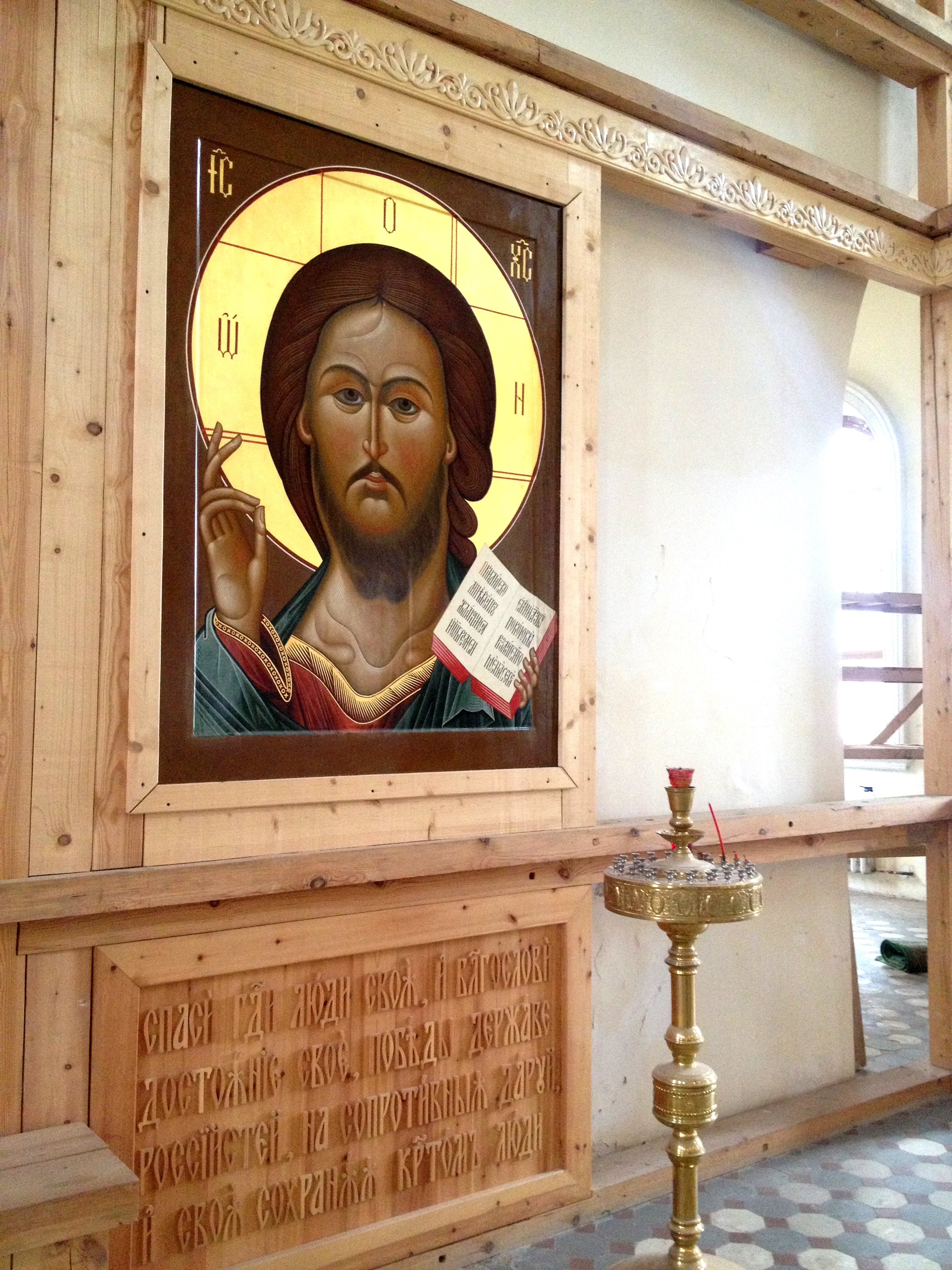 Фрагмент иконостаса Покровского кафедрального собора Казанско-Вятской епархии Русской Православной Старообрядческой Церкви (г. Казань, 2014 год).